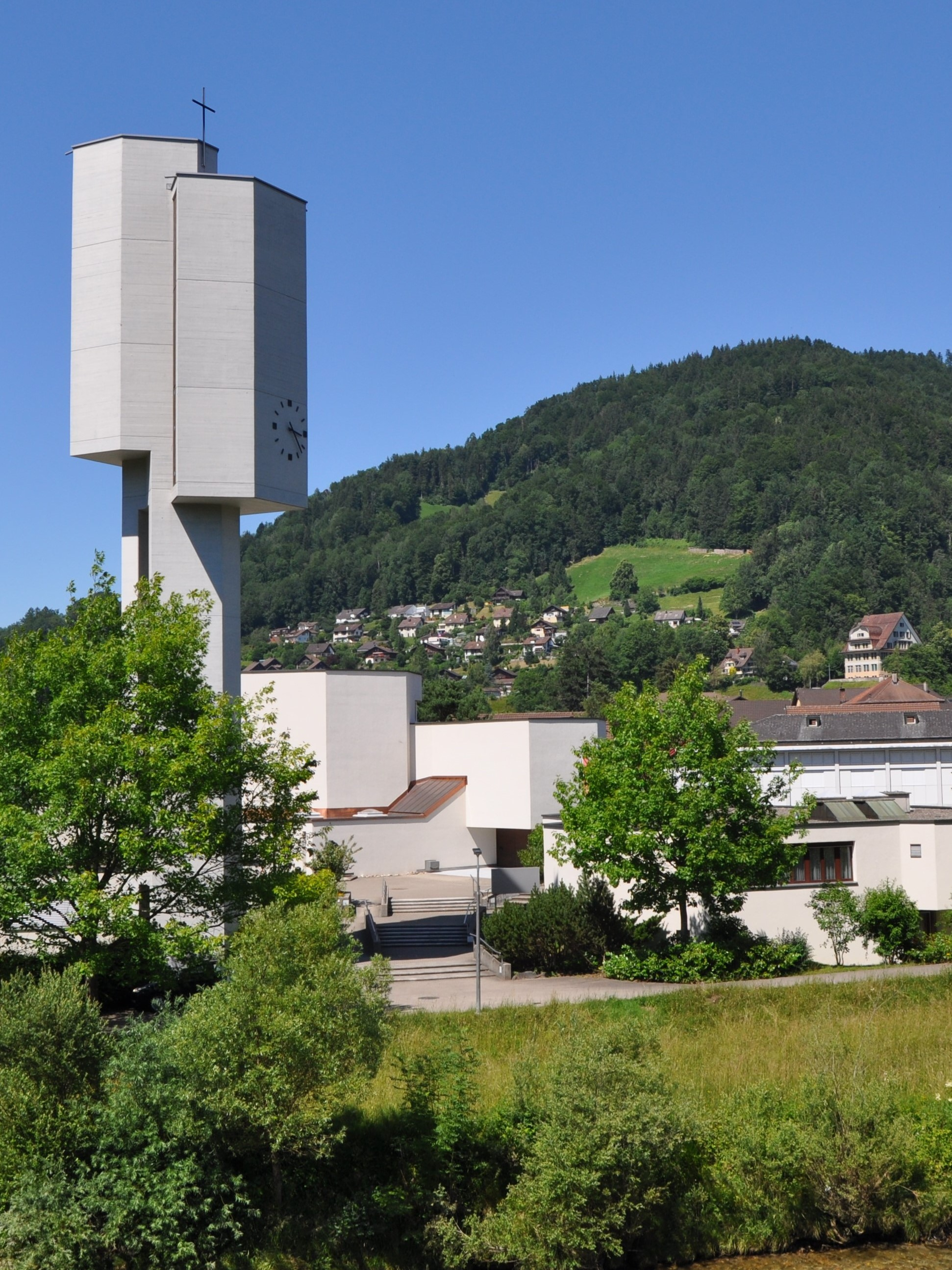 Gesamtansicht mit Kirchturm, Kirchgebäude, Vorplatz und Pfarreizentrum